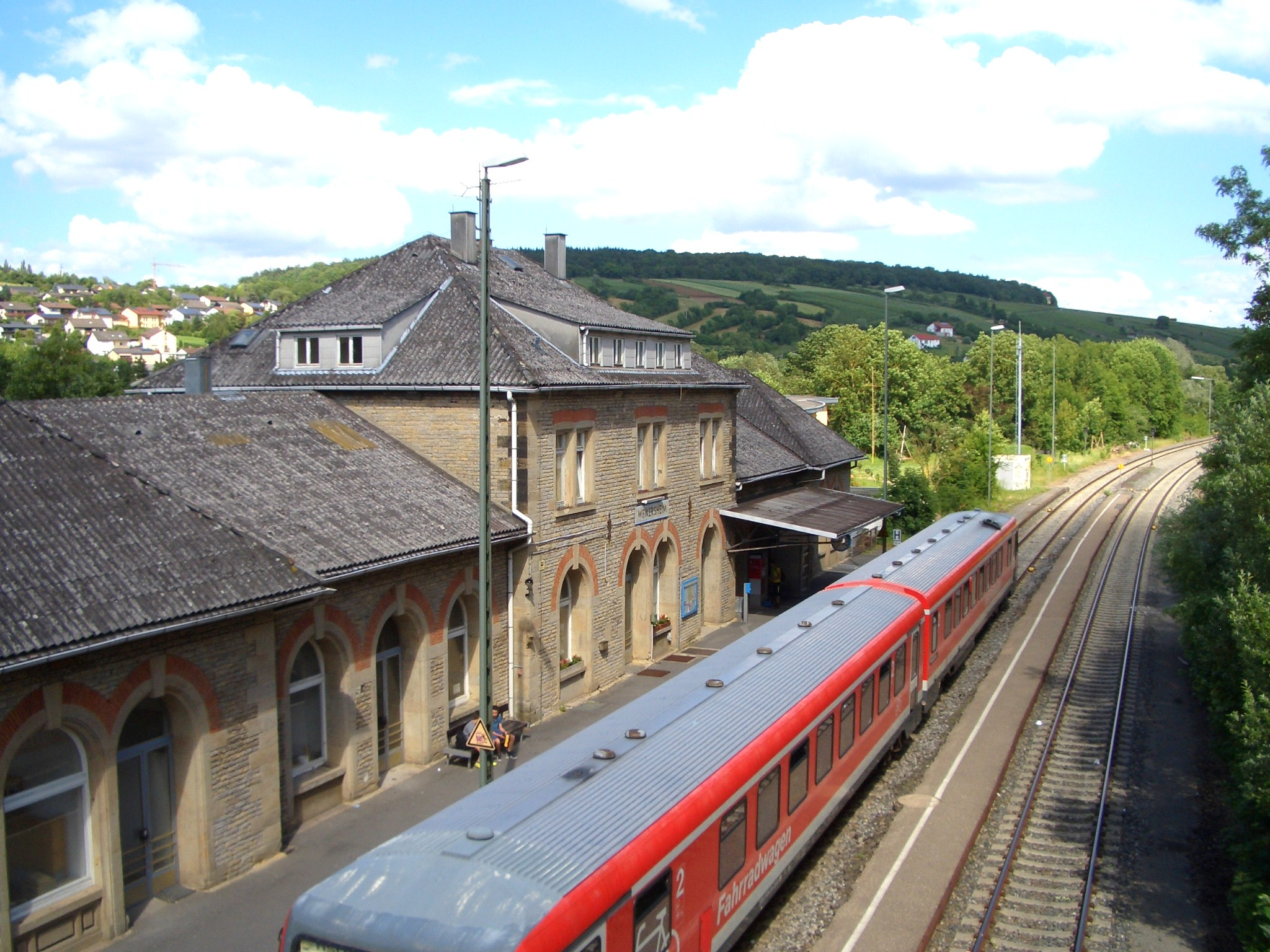 Weikersheim, Bahnhof, Gleis 1